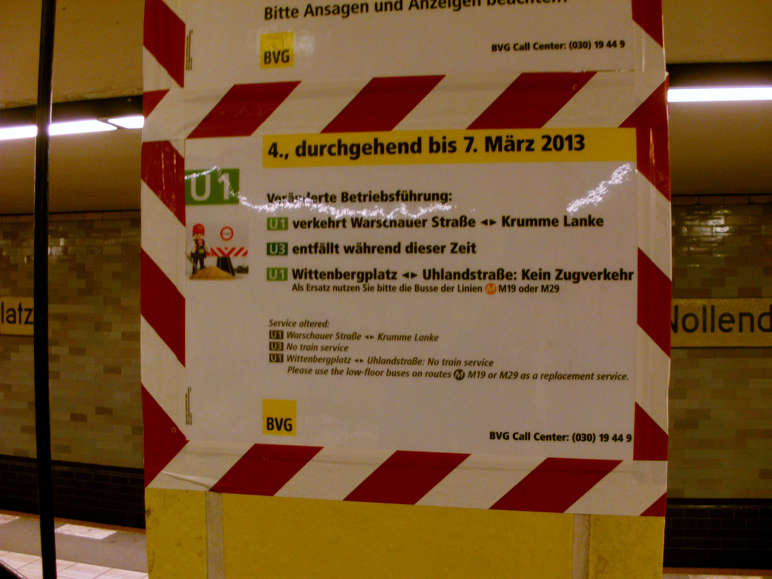 Plakat mit Bauinfos zu den Linienänderungen auf der U1 und U3 im März 2013.